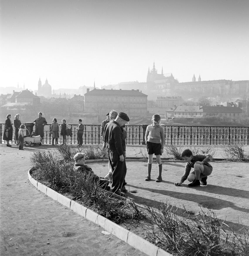 Praha, nábřeží u Rudolfina